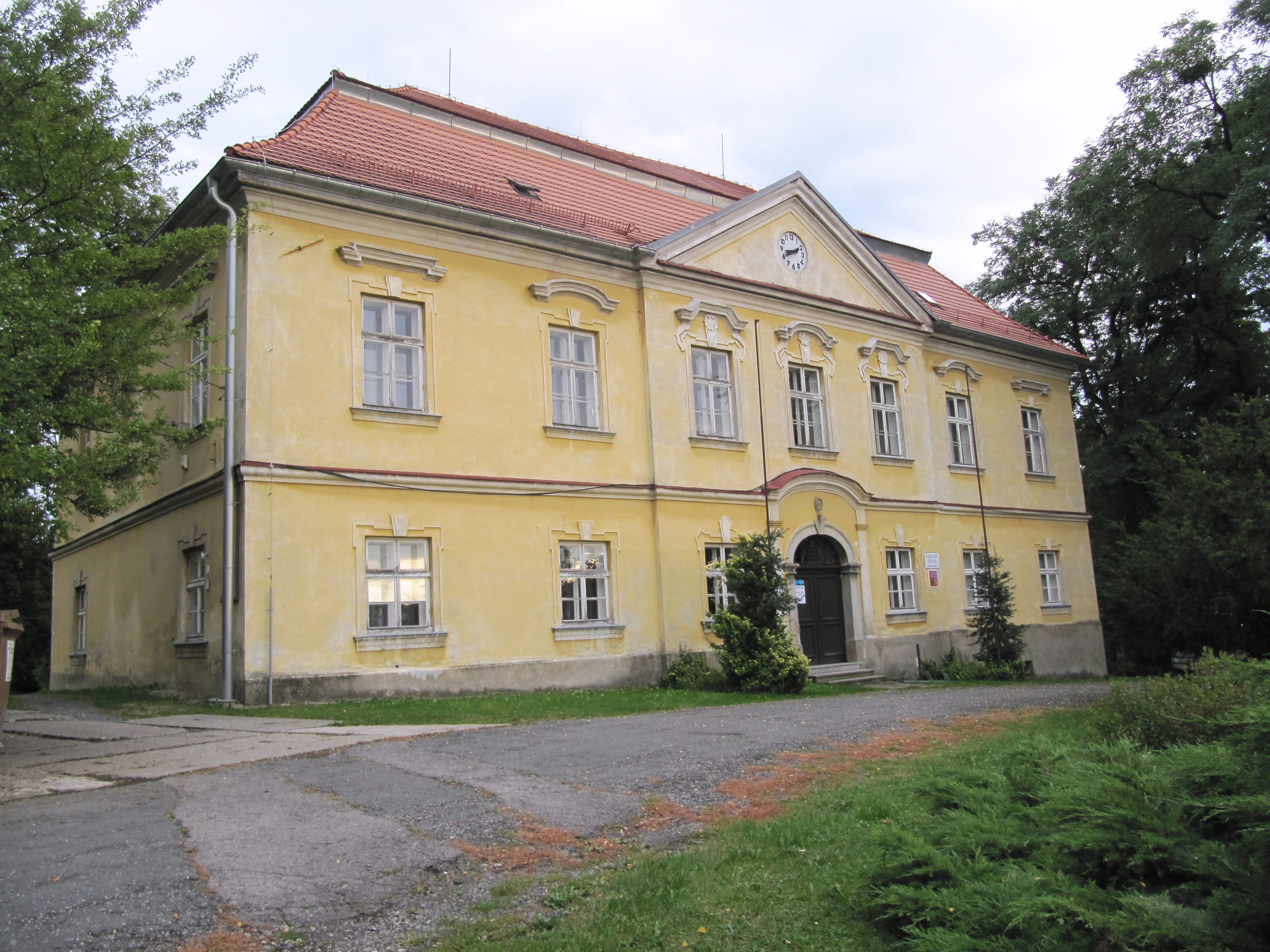 Trnávka (NJ)